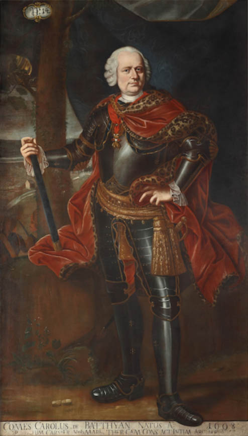 Batthyány Károly (1698-1772.) magyar tábornagy, nagybirtokos.